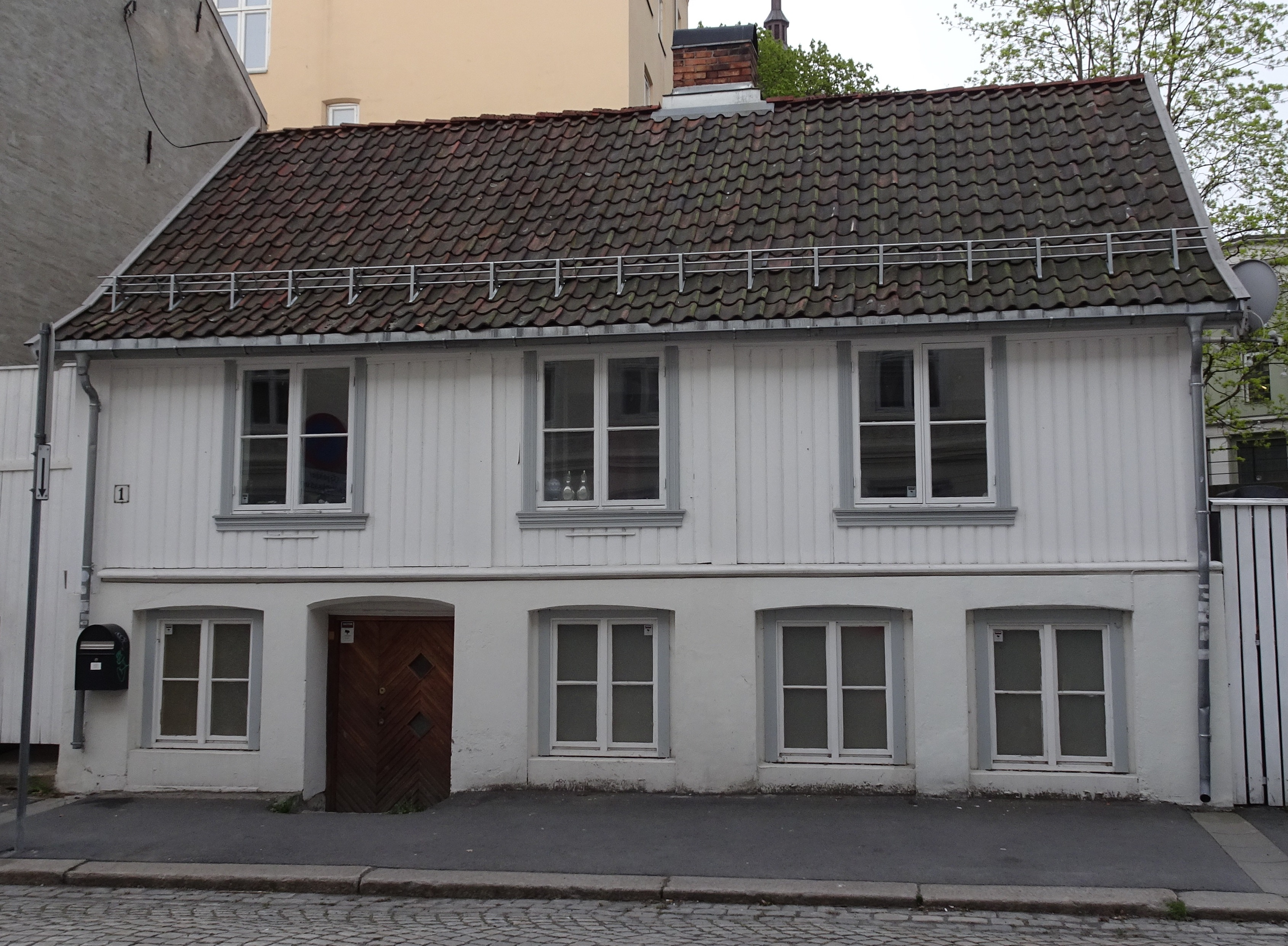 Fredensborgveien 1A, fra 1827. Vernet etter PBL.